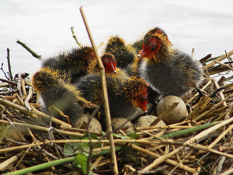 Blässhuhn-Küken im Nest (Werdenberger-See Schweiz)